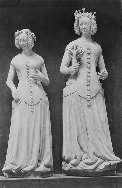 Moulages de deux statues (Jeanne de Boulogne et Isabeau de Bavière) provenant de la cheminée de la salle des Pas-Perdus du palais de Justice de Poitiers. Conservées au Musée de sculpture comparée au palais du Trocadéro, Musée des monuments français.